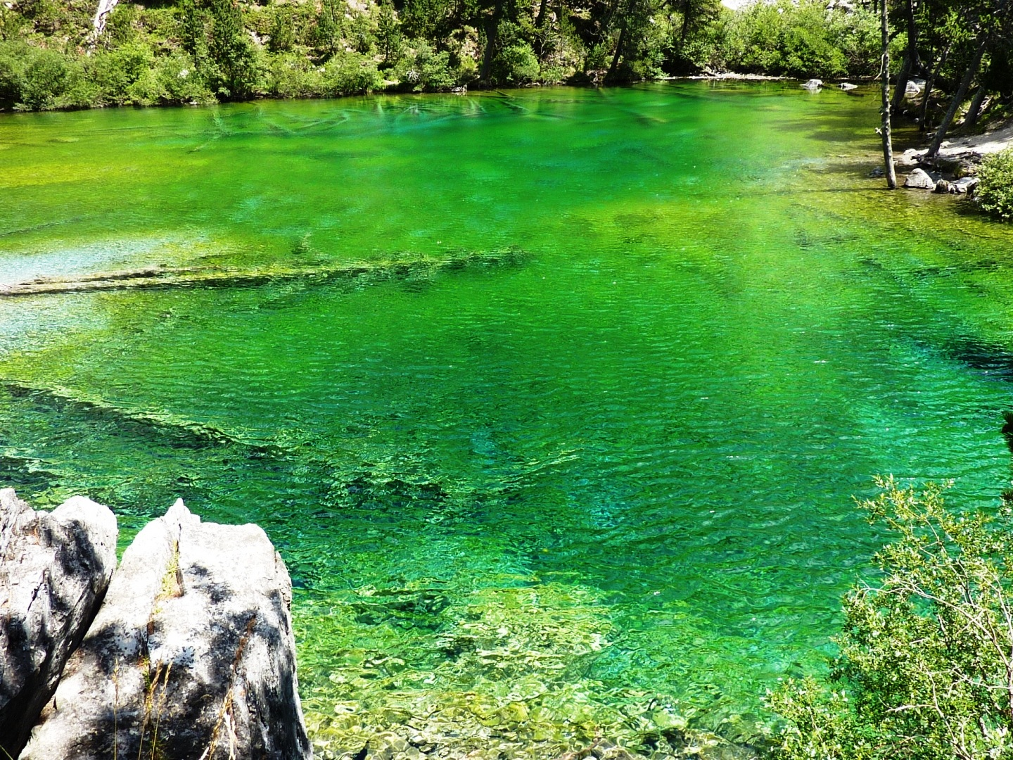 Le lac Vert et situé dans la Vallée Étroite (45° 4' 46.00" N 6° 36' 54.00" E). De faible profondeur il tient sa couleur des algues qui couvrent son fond.